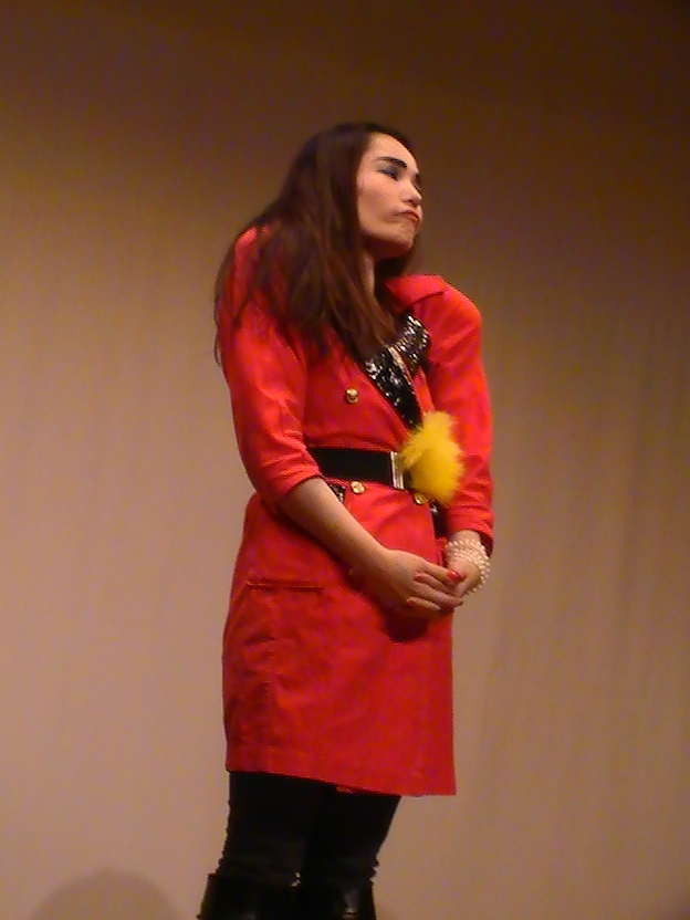 平野ノラ (2016年1月)